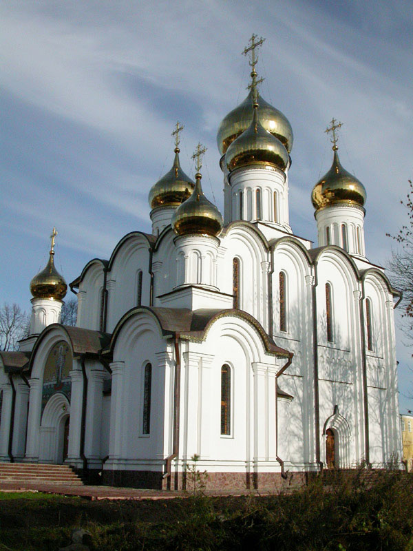 Никольский собор в Переславле-Залесском, разрушен при советской власти, возведён снова в 2003